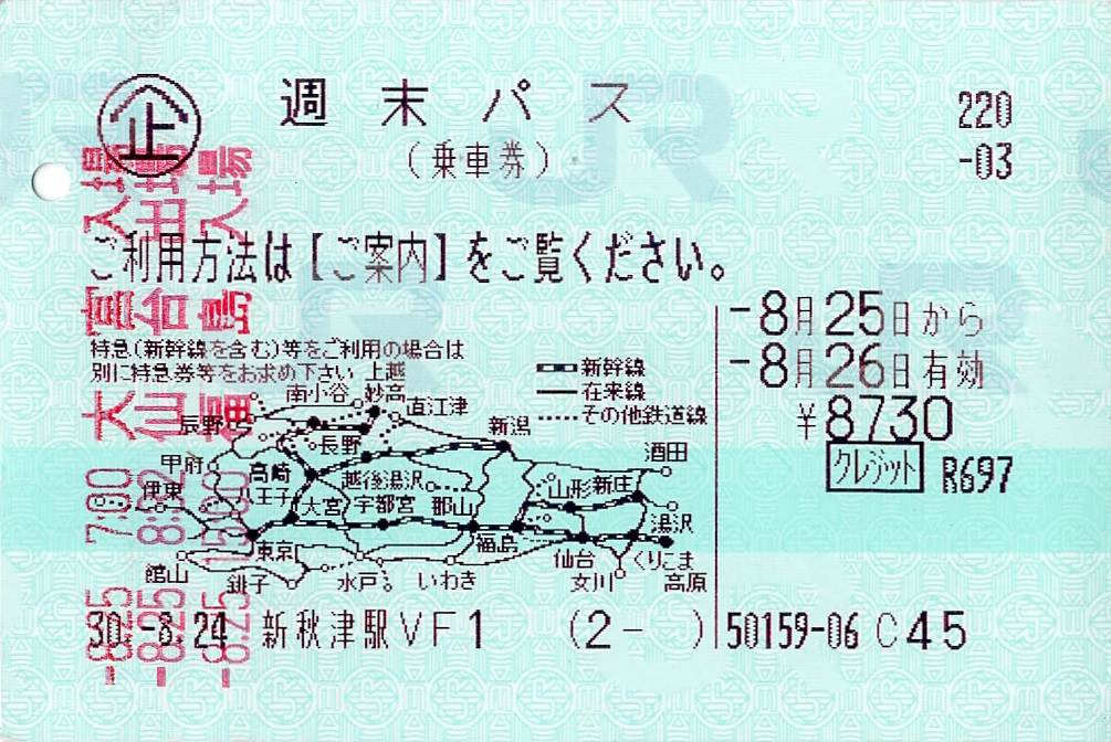 JR東日本の「週末パス」。